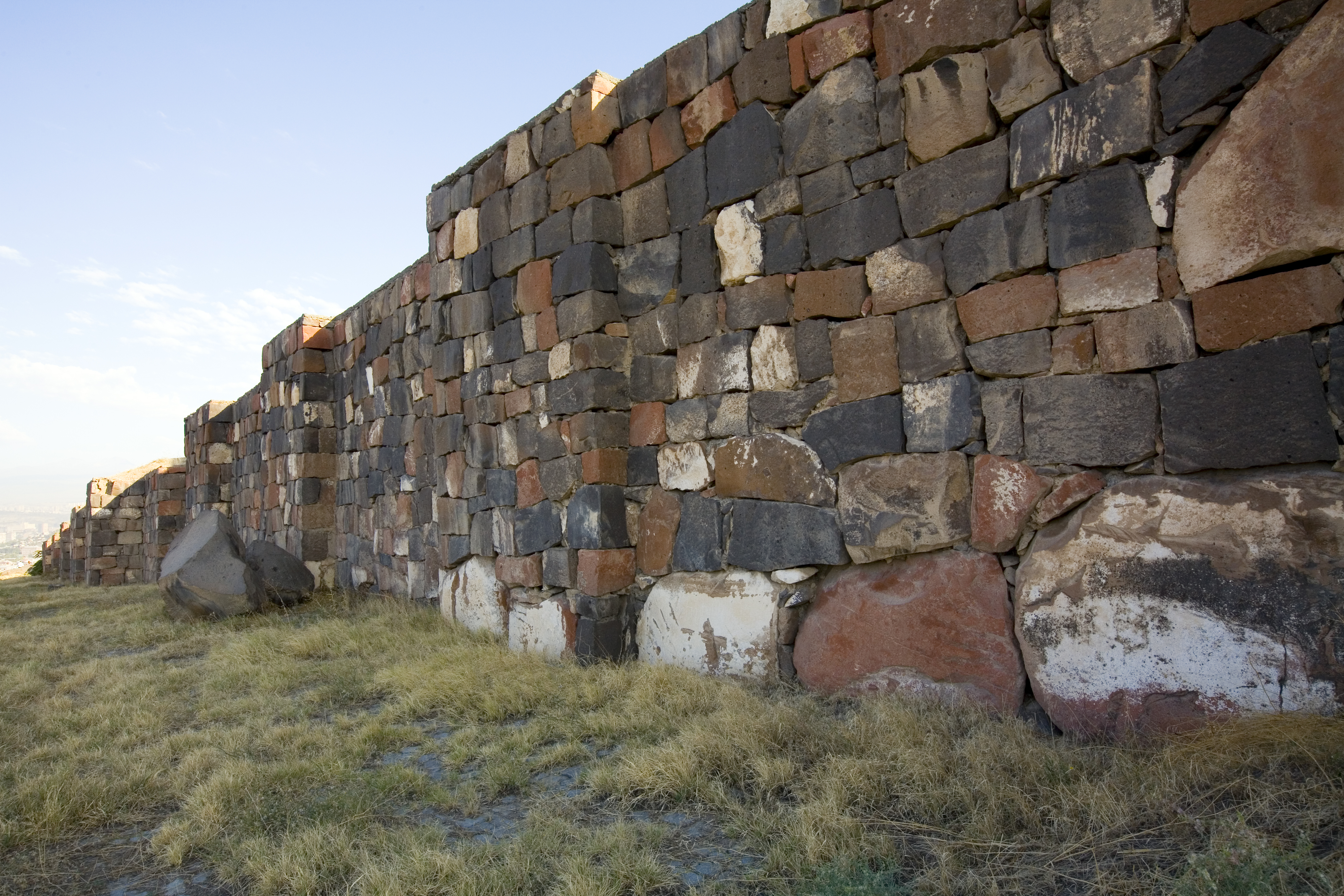 Erebuni Wall